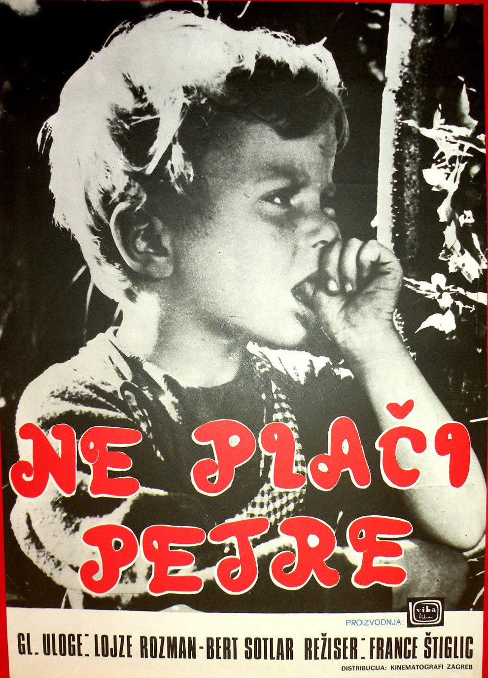 Plakat filma Ne joči, Peter.